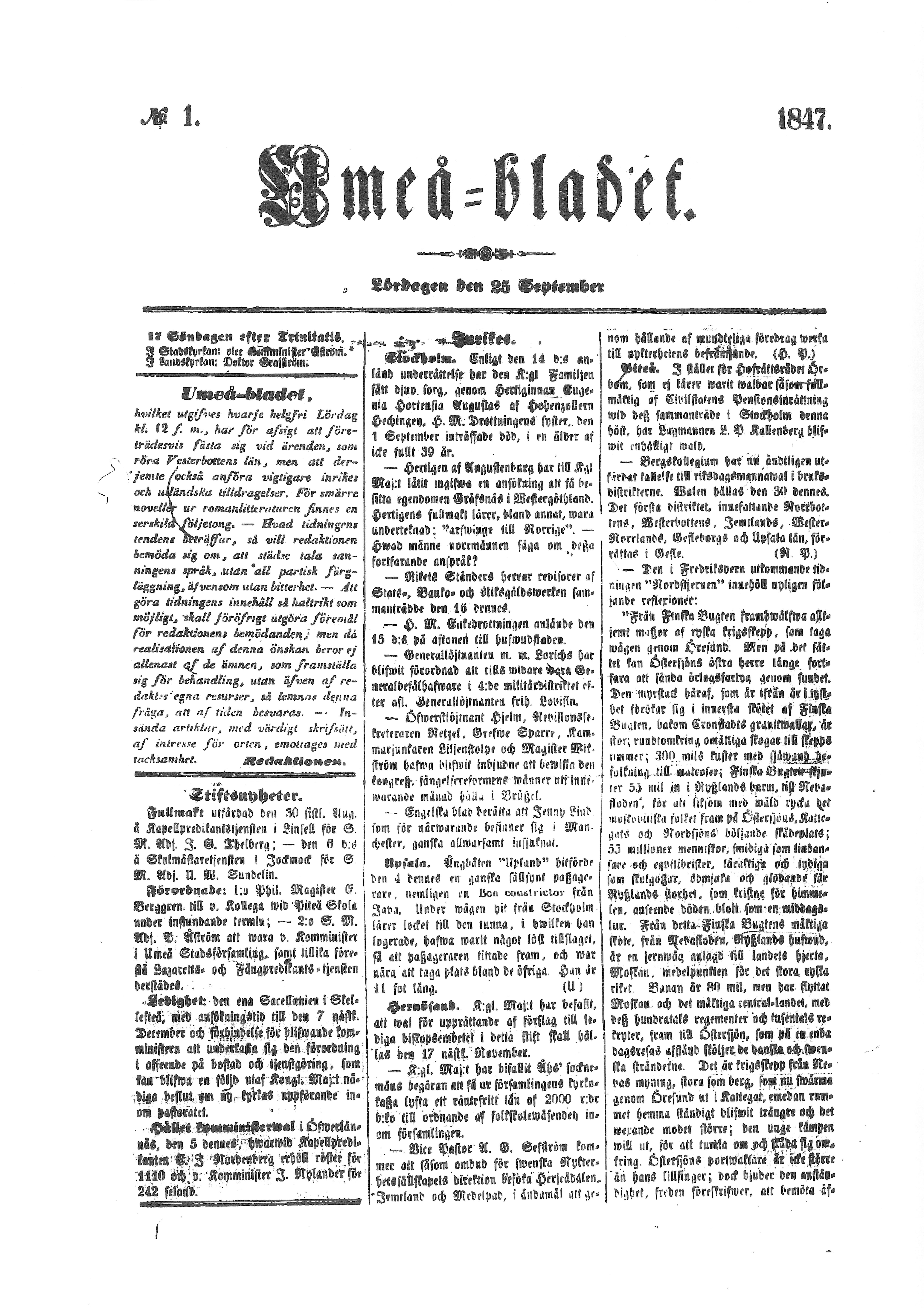 Umeå-Bladet , första numret 1847